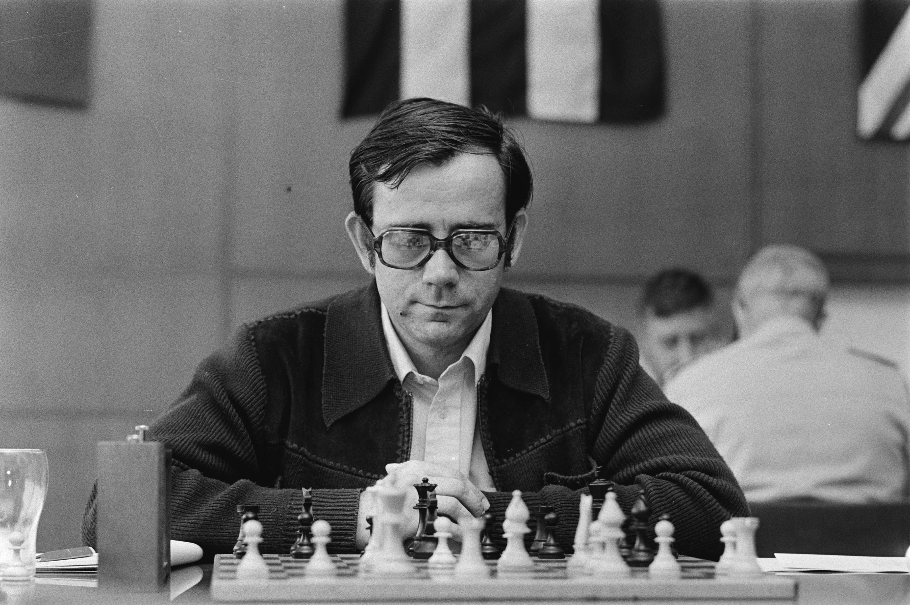 IBM Schaaktoernooi 1979 in de RAI te Amsterdam, Jan Smejkal.